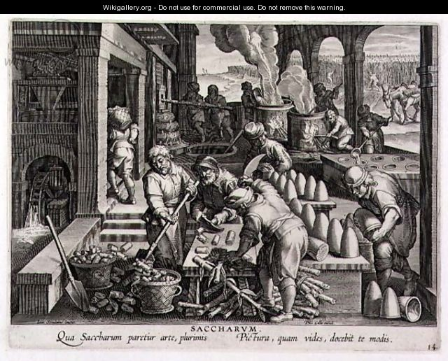 Productieproces rietsuiker